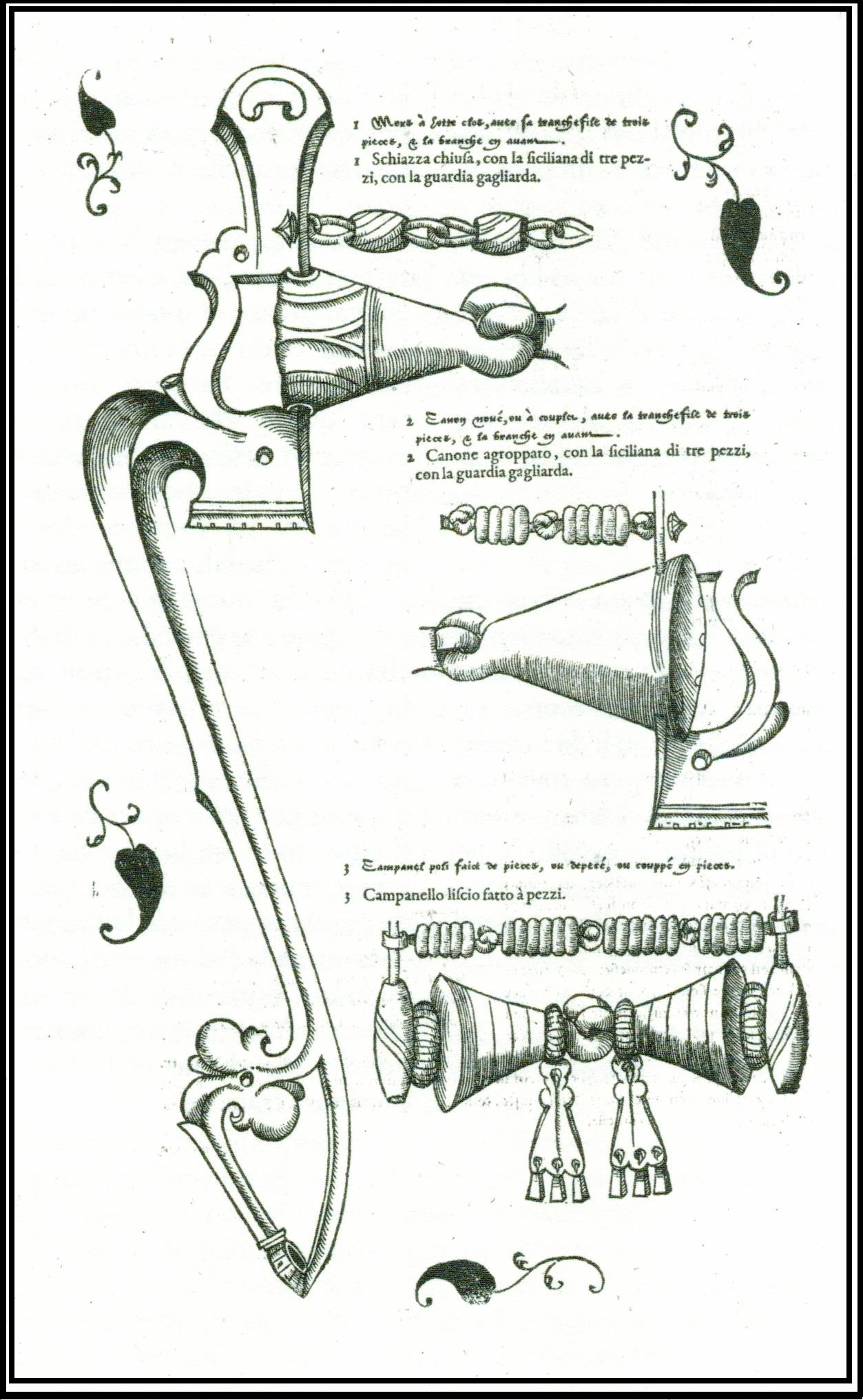 Image extraite du livre L'Escuieri de M. de Pavari vénitien